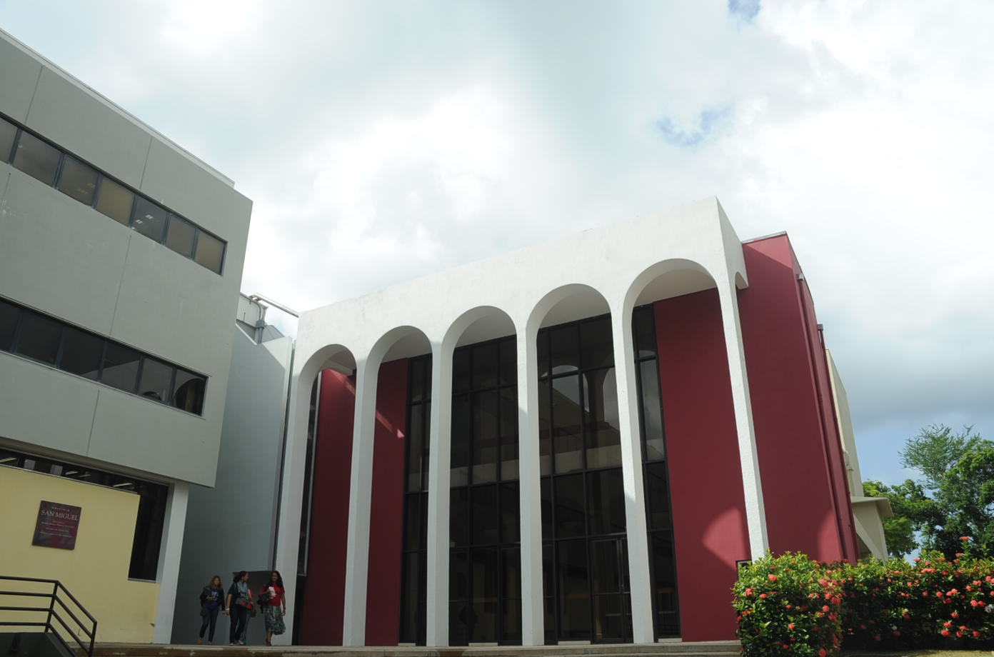 Teatro Emilio S. Belaval en la Universidad del Sagrado Corazón.